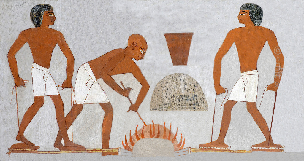 La fonte du minerai de cuivre en Égypte. Document nettoyé pour permettre une meilleure compréhension du système de chauffe, notamment la partie "soufflerie". Le document original est disponible sur le site du British Muséum "Egyptian Copper Smelting Process".